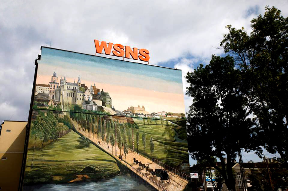 Mural na WSNS w Lublinie